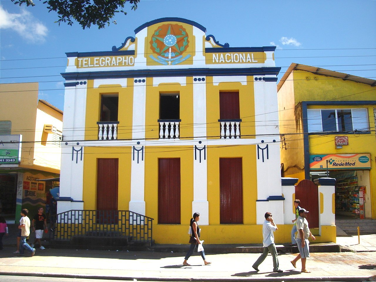 Foto do Museu Histórico e Geográfico de Campina Grande, Brasil.